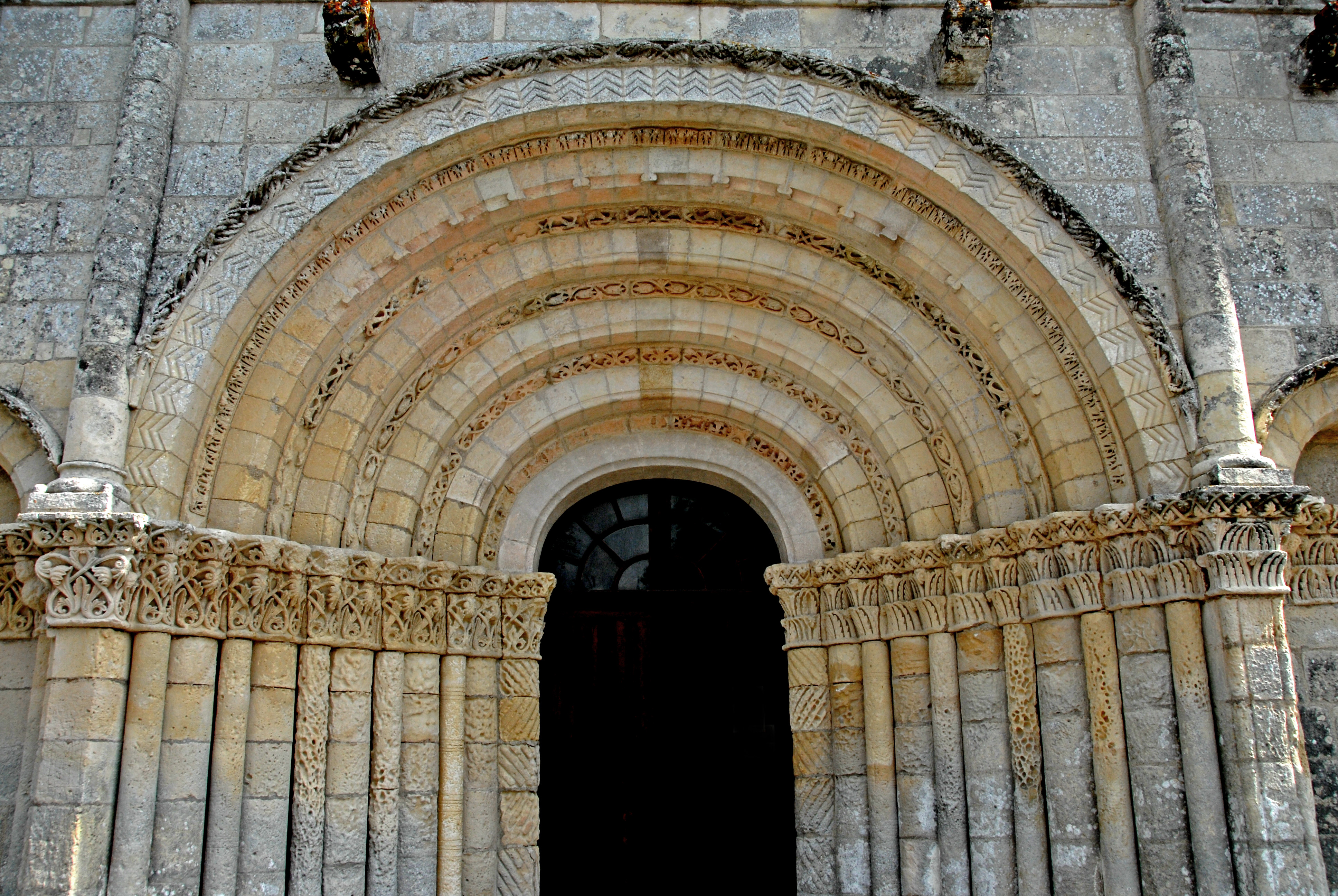 Echebrune, St.-Pierre, Archivoltenportal